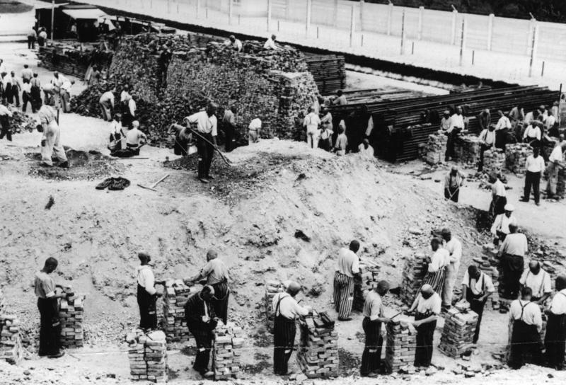 Dachau, Konzentrationslager Schutzhaftlager Dachau.- Häftlinge bei der Arbeit, Ziegelsteine stapelnd.